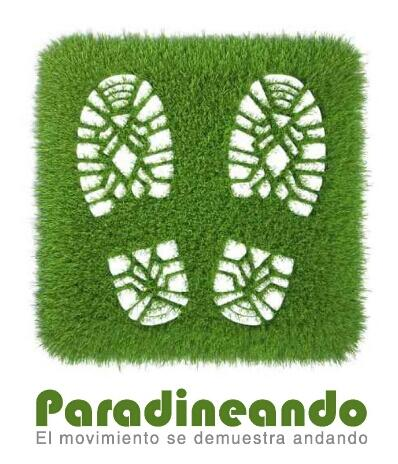 El Movimiento se demuestra andando